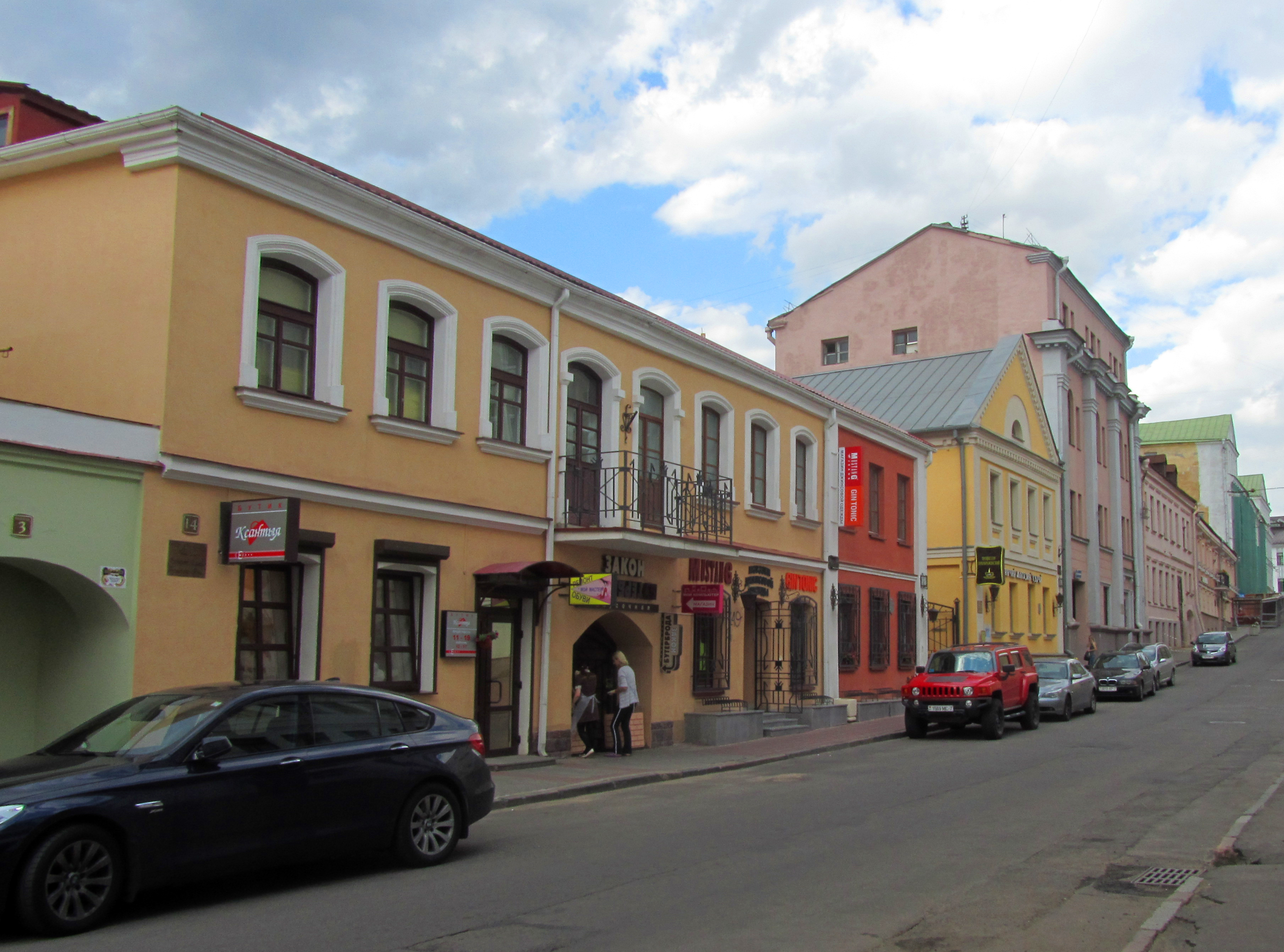 Беларуская (тарашкевіца): Гістарычны цэнтар г. Менску: будынкі і збудаваньні, пляніровачная структура, ляндшафт і культурны пласт. г. Менск This is a photo of Belarusian heritage monument. Reference number: 711Е000001 ( WLM)